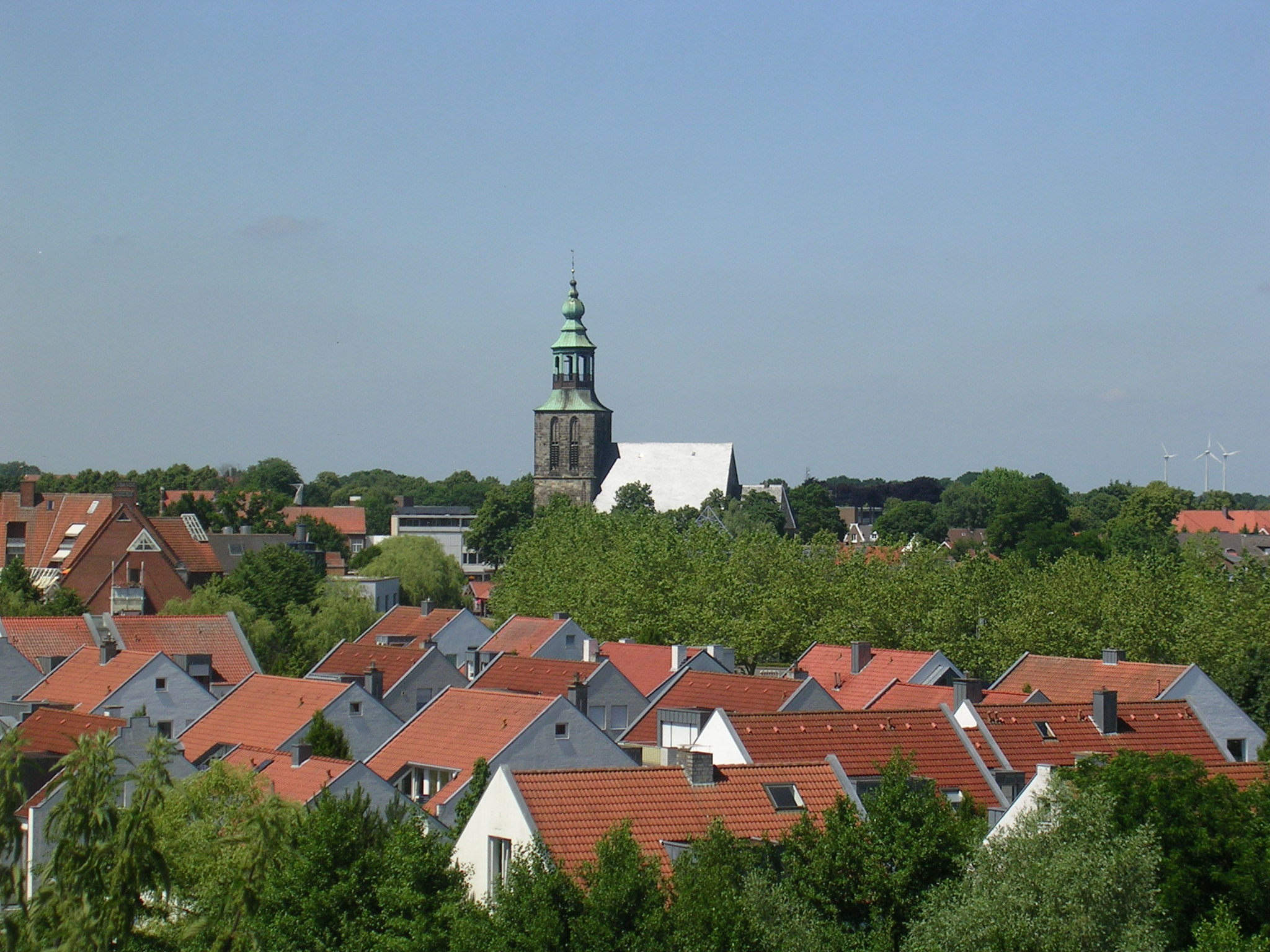 Bildbeschreibung: Blick vom Povelberg auf Nordhorn "selbst fotografiert" Fotograf: Heribert Duling (Famduling) Datum: 2005